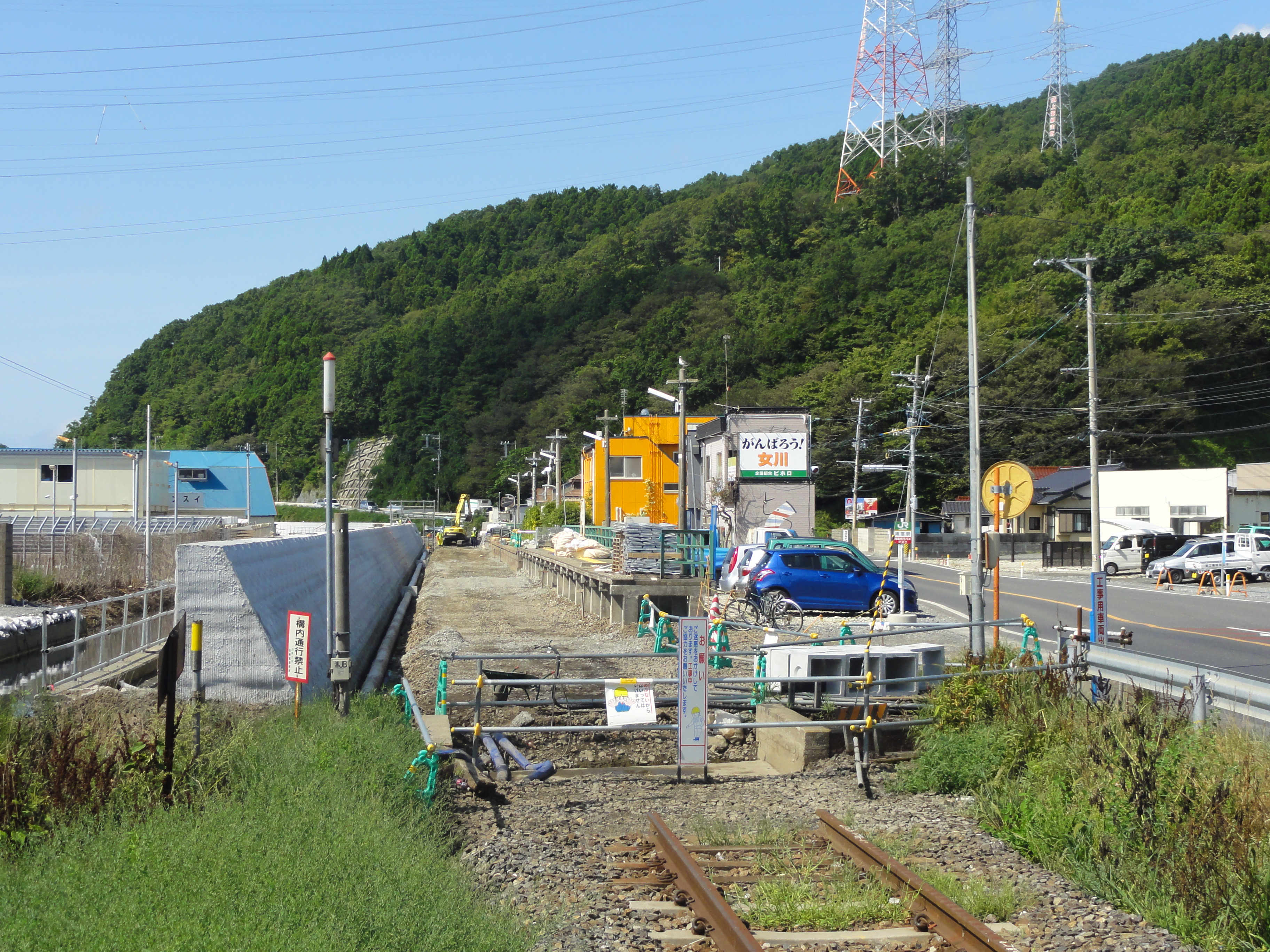 浦宿駅ホーム